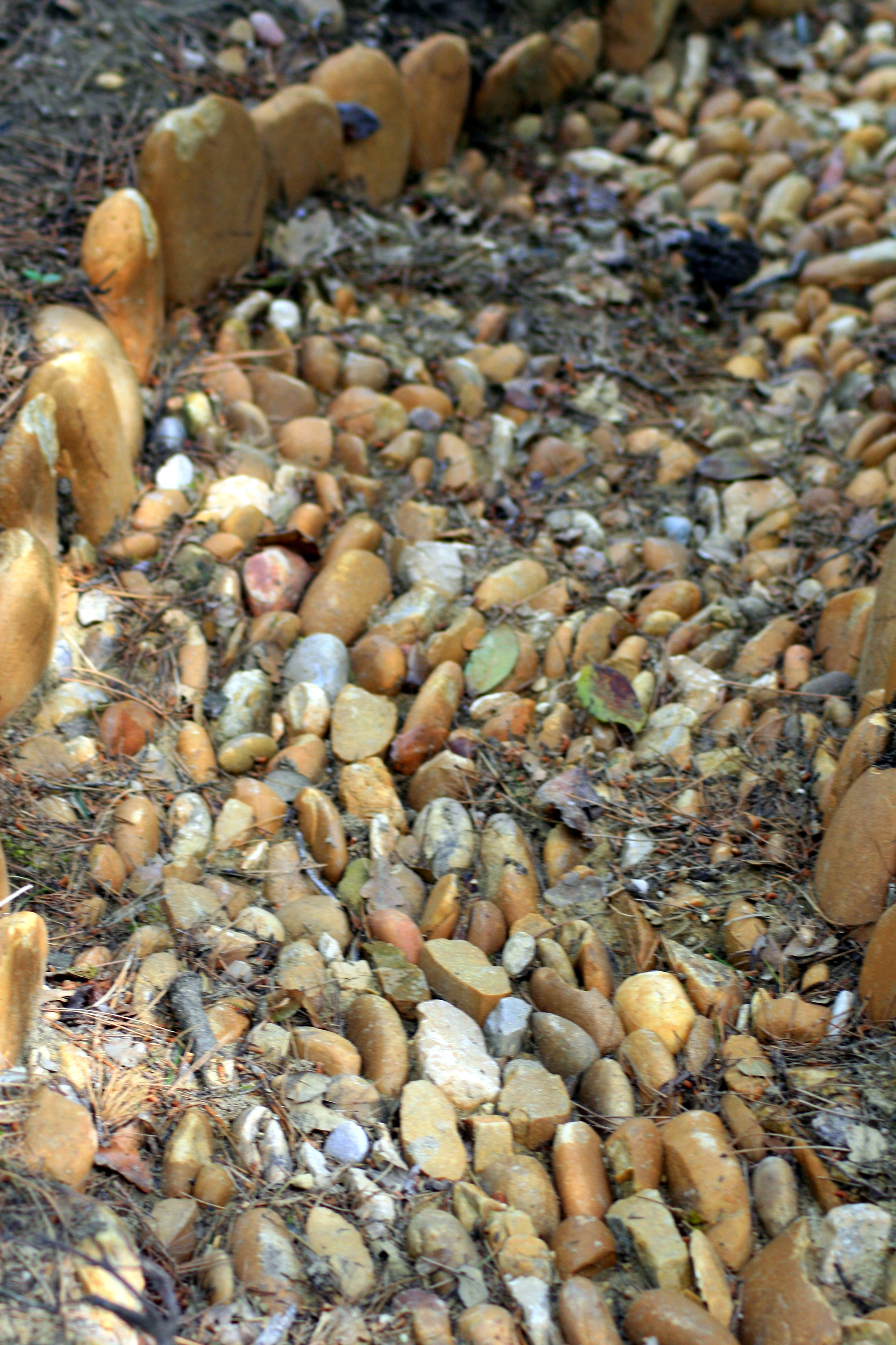 Fosse d'orage avec petits galets